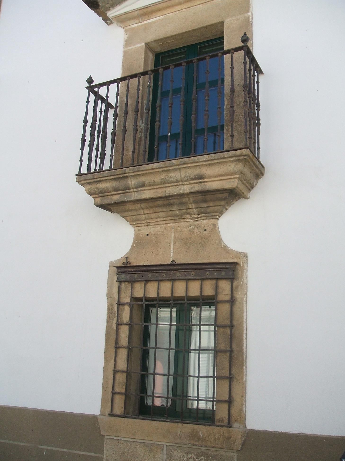 Navas del Madroño en Cáceres. Una característica de su arquitectura popular es el dintel en piedra corrido, que sube por la fachada desde la puerta o una ventana hasta la base del balcón.